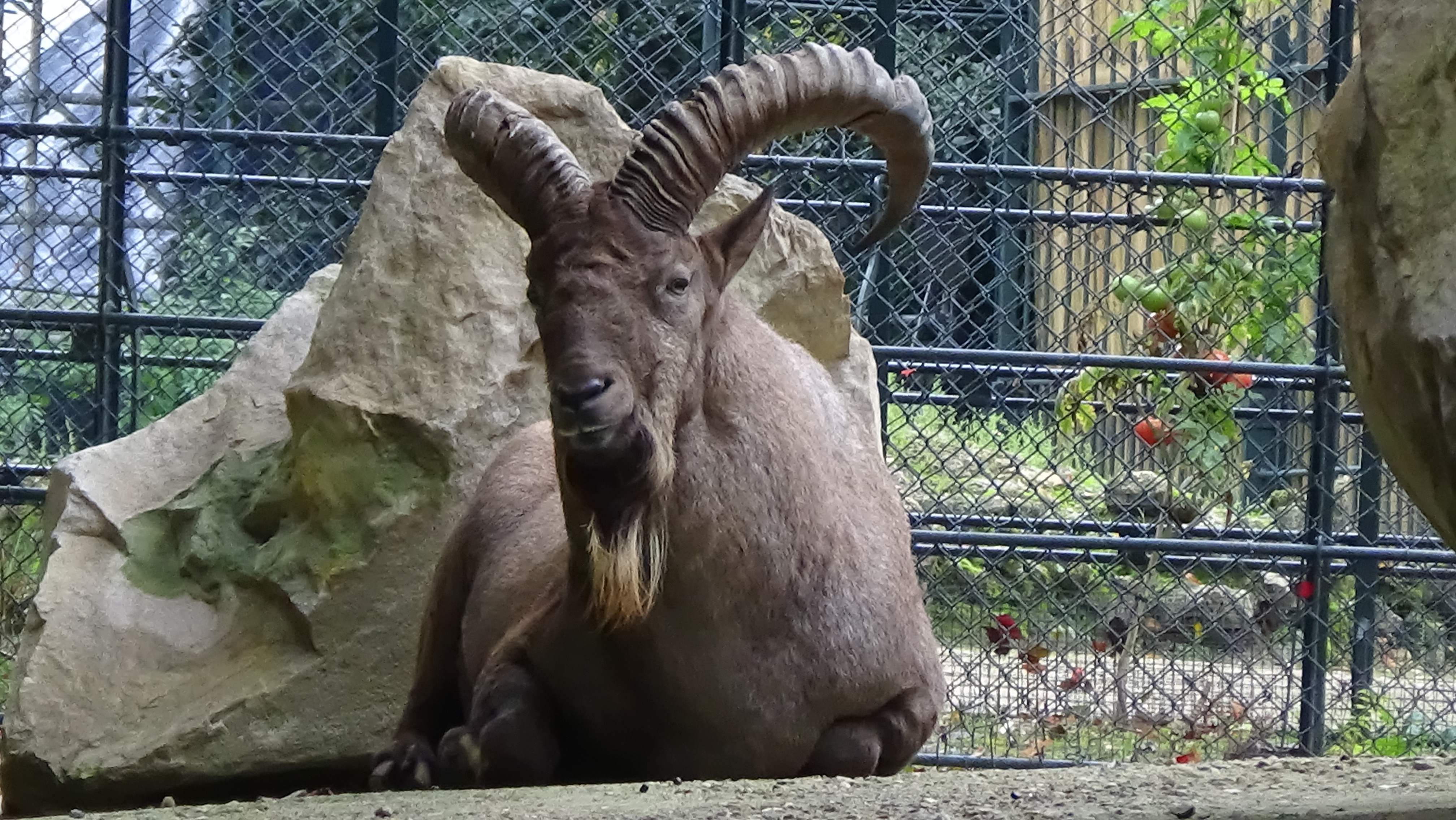 Capra caucasica caucasica wiki menagerie